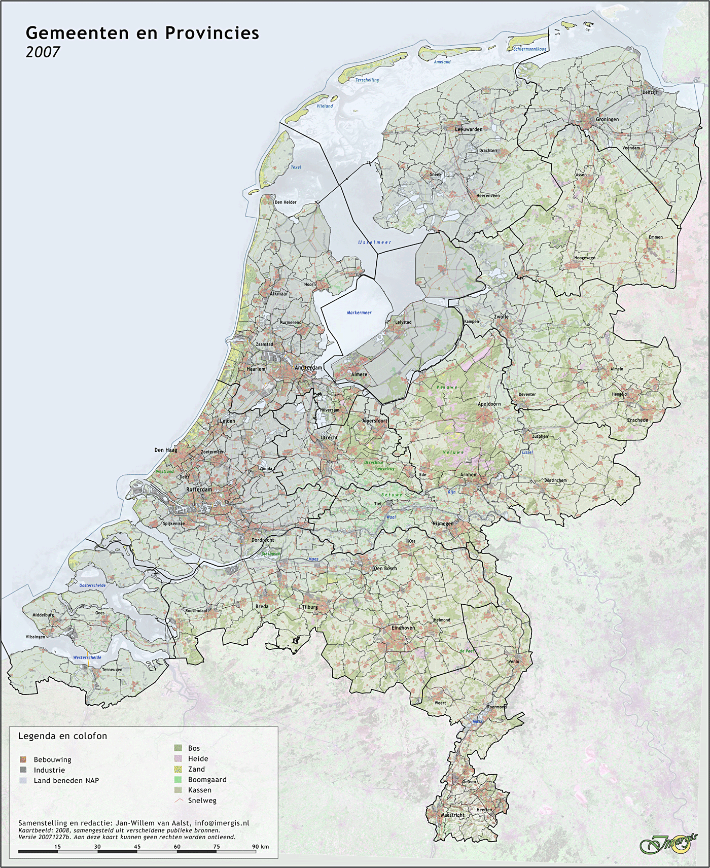 Kaart van gemeenten en provincies, grenzen per 1-1-2007 (1440 pix)